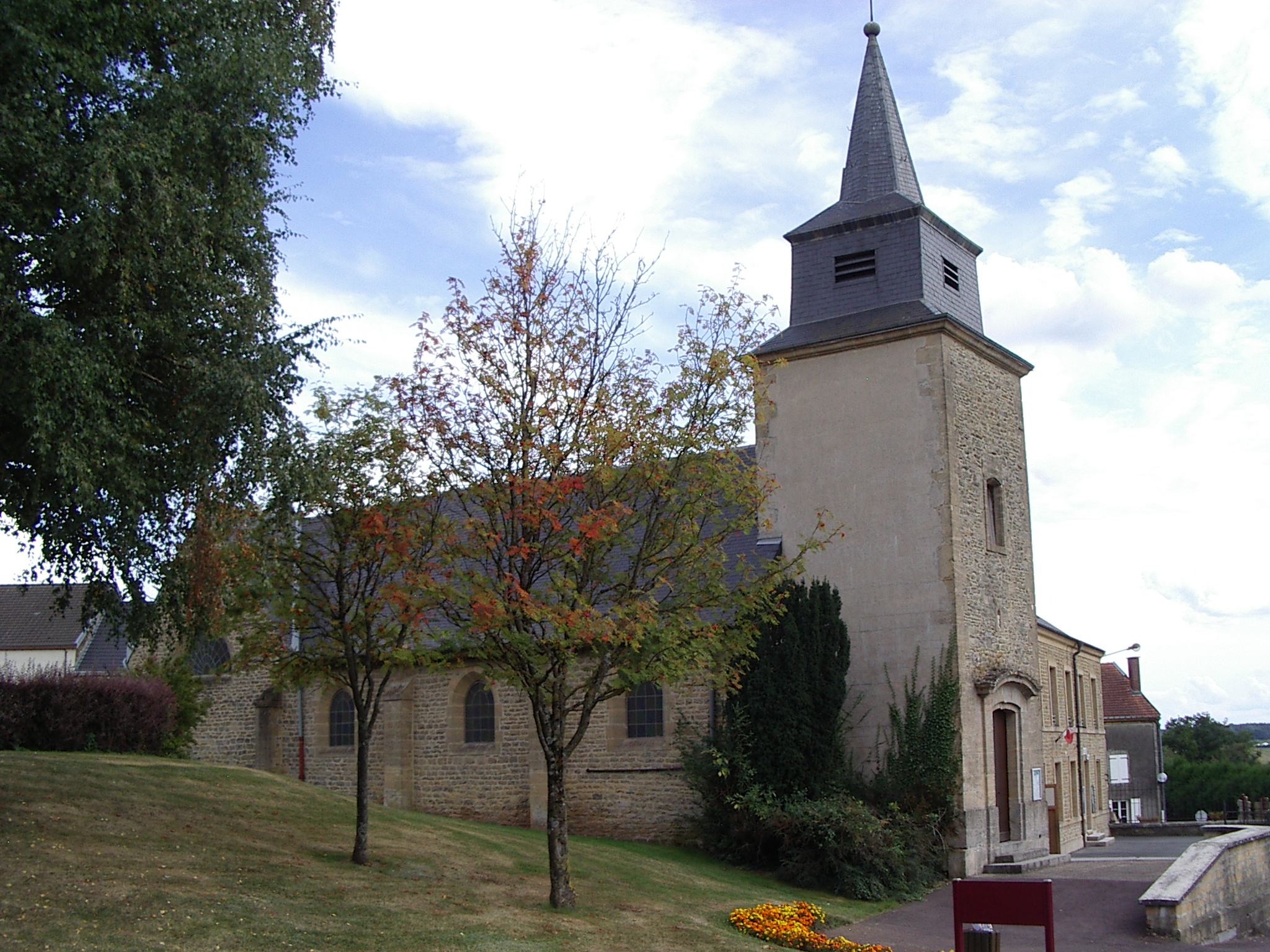 Eglise paroissiale : Fleigneux est une commune française, située dans le département des Ardennes et la région Champagne-Ardenne.